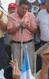 Alfredo De Angelis en asamblea organizada por las Sociedad Rural Argentina, CRA, CONINAGRO y FAA, en Gualeguachú (Argentina), el 2 de abril de 2008, durante el paro patronal.